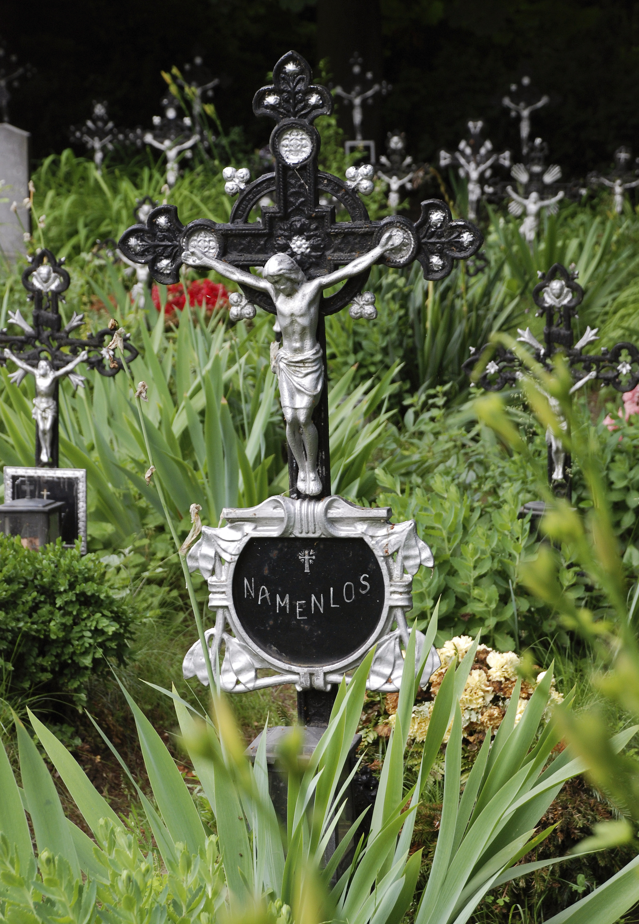 Alberner Hafenzufahrtsstraße, 1110 Wien, Friedhof der Namenlosen